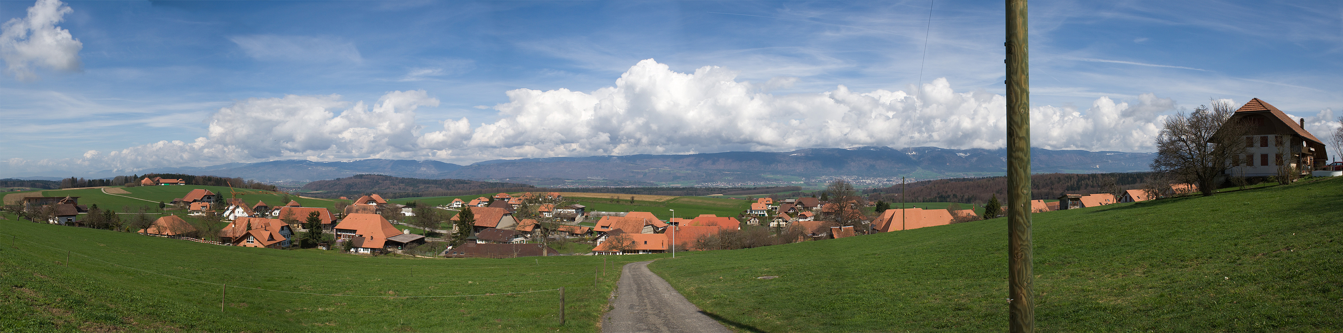 Panorama von Biezwil, Schweiz